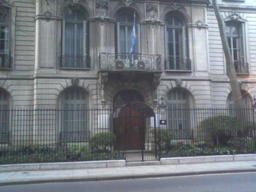 Fachada de la Casa de las Academias Nacionales. Avenida Alvear 1711. Buenos Aires.